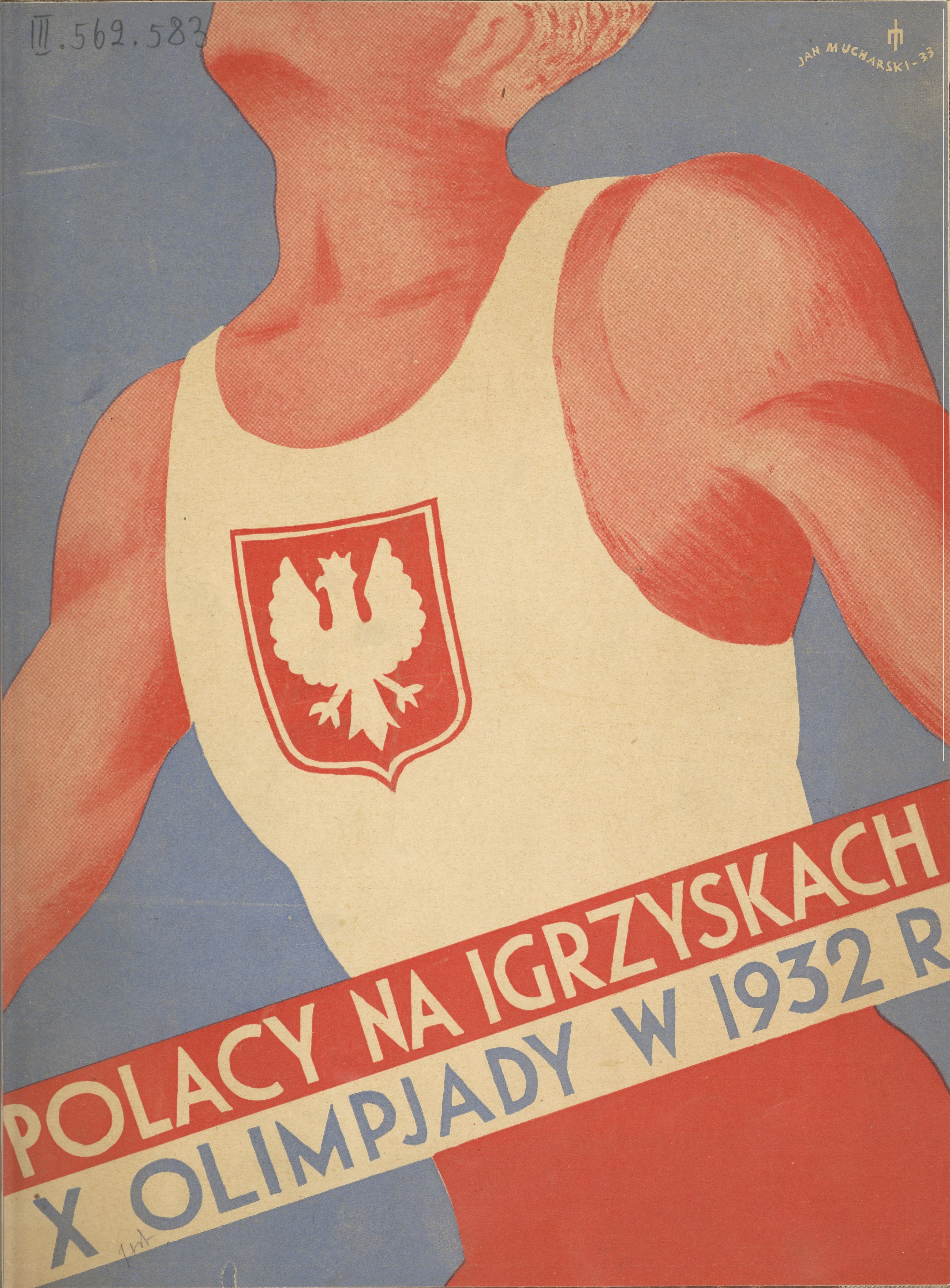 Polacy na Igrzyskach X Olimpiady 1932